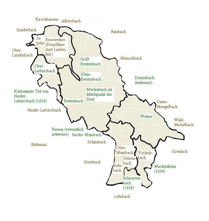 Die Dörfer der Zent Mörlenbach (grün) und die Ortsteile der Gemeinde Mörlenbach (eingerahmt)